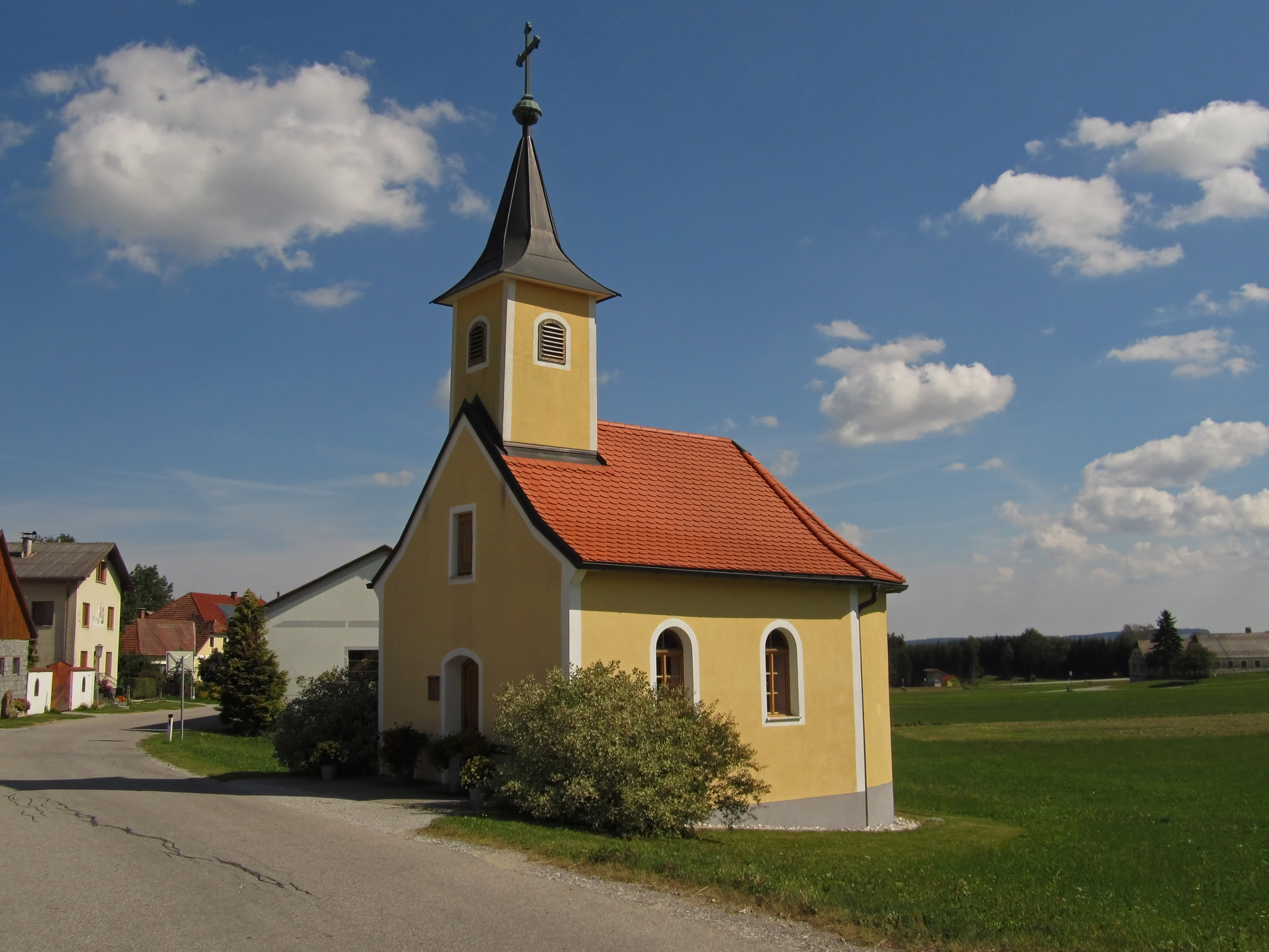 Die schlichte, im Jahr 1900 erbaute Kapelle mit Rundapsis ist dem hl. Hyppolyt geweiht. Sie hat einen Dachreiter mit Spitzhelm und ist innen flachgedeckt.